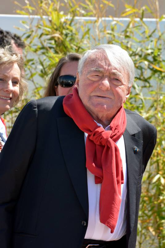 Claude Lanzmann au festival de Cannes